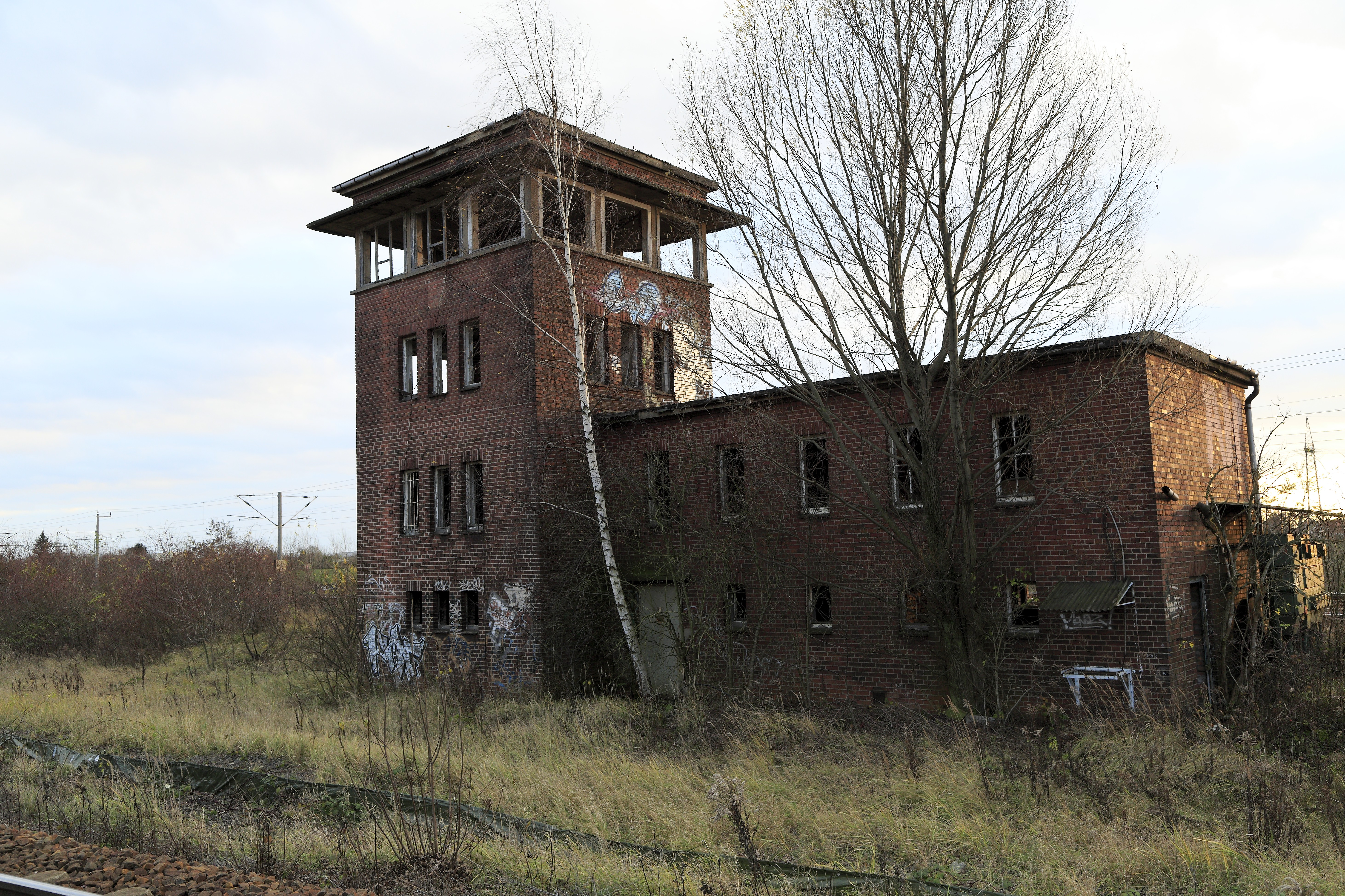 Inzwischen vollständig ausgeräumt, zwischen hier und Ws auf der Westseite lag auch früher schon die Einfahrgruppe.